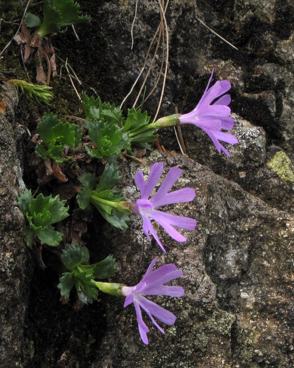 Najmanjši jeglič na Komnu (Smrekovec).